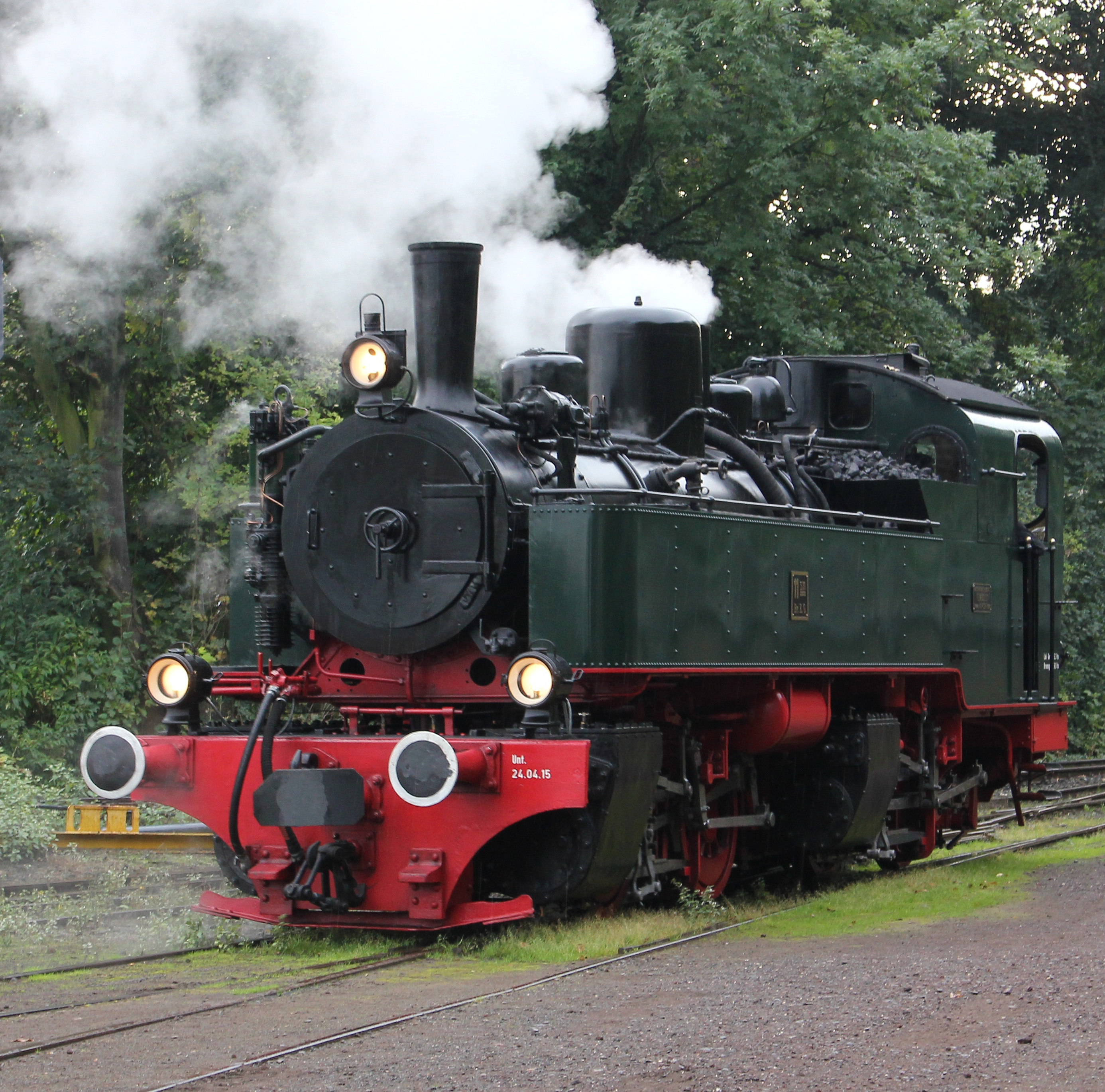 Mallet-Lokomotive der Brohltalbahn, 1906 von der Maschinenfabrik Humboldt in Köln-Kalk gebaut, Nr. 348, nach der letzten Fahrt vom 29. Januar 1966 stillgelegt und von November 2008 bis Februar 2015 restauriert, erste planmäßige Fahrt danach am 1. Mai 2015 - Ausschnitt